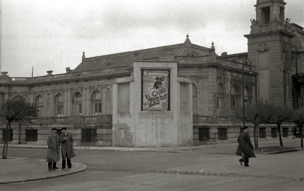 Título original: Vistas del Casino Gran Kursaal en cuyas paredes se anuncia la proyeccion de la pelicula 'El Signo del Zorro' (1/1) Localización: San Sebastián (Guipúzcoa)